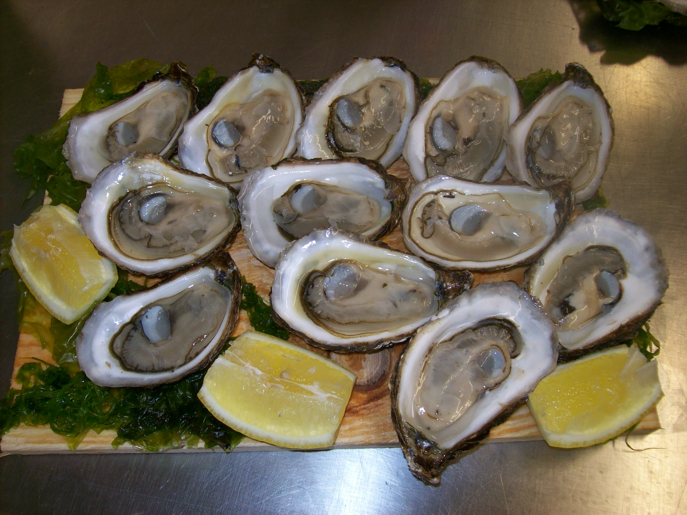 Plateau de Crassostrea virginica d'élevage (Nouveau-Brunswick)